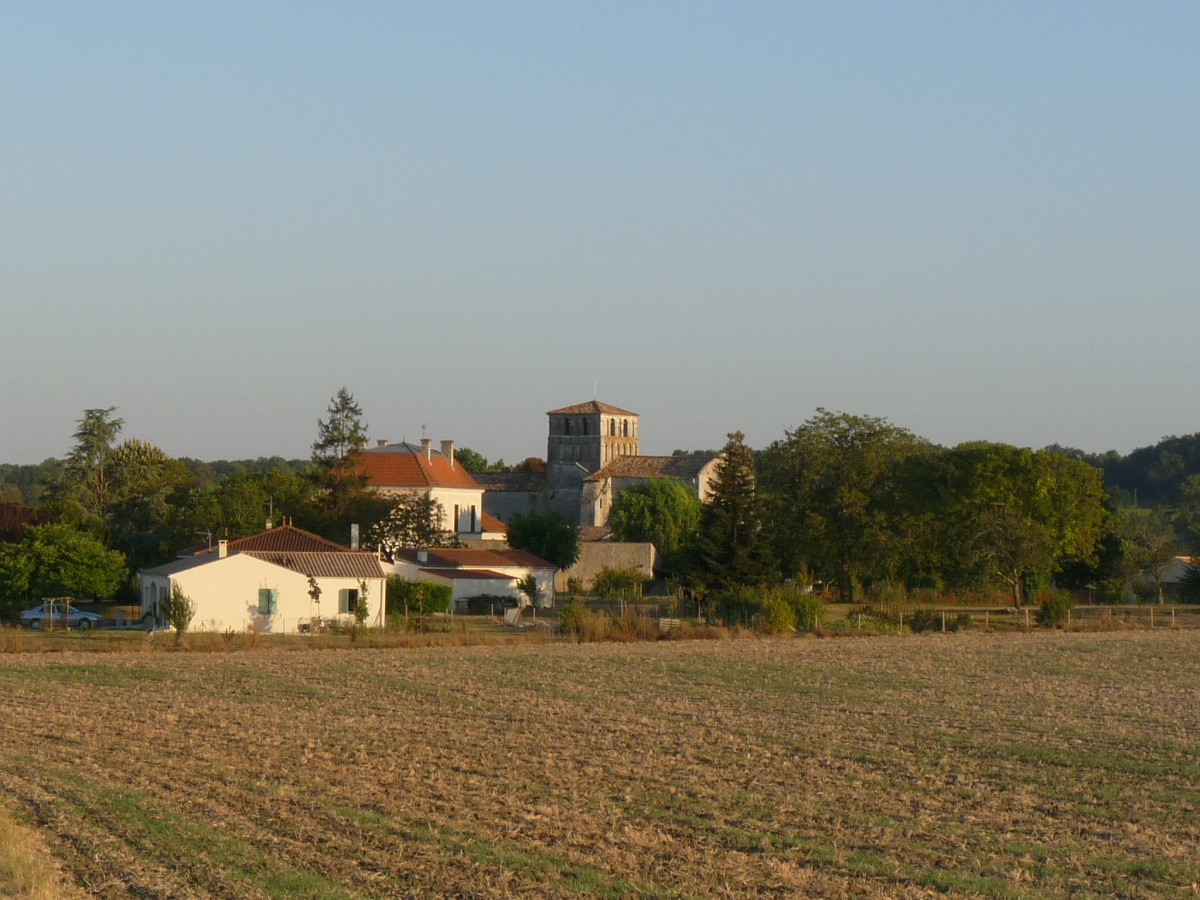 Vue du sud-est de St-Martial-de-Mirabeau, Charente-Maritime, France